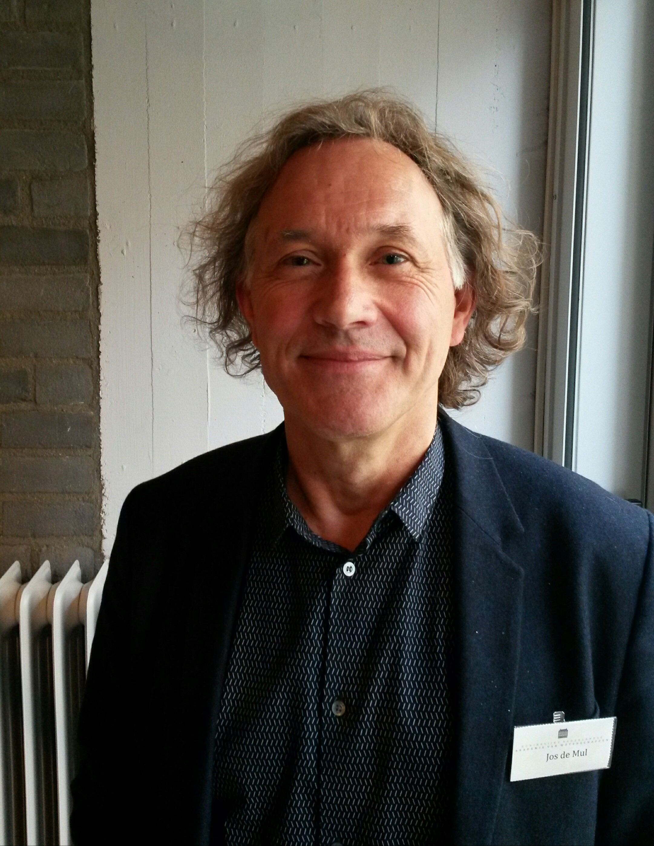 Jos de Mul (KNAW-bijeenkomst nov. 2015)